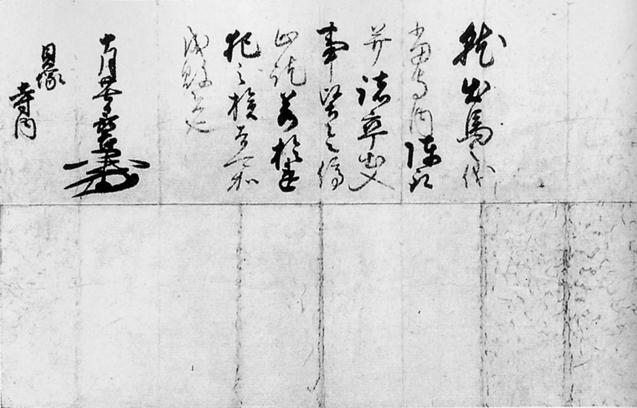 羽柴秀吉禁制